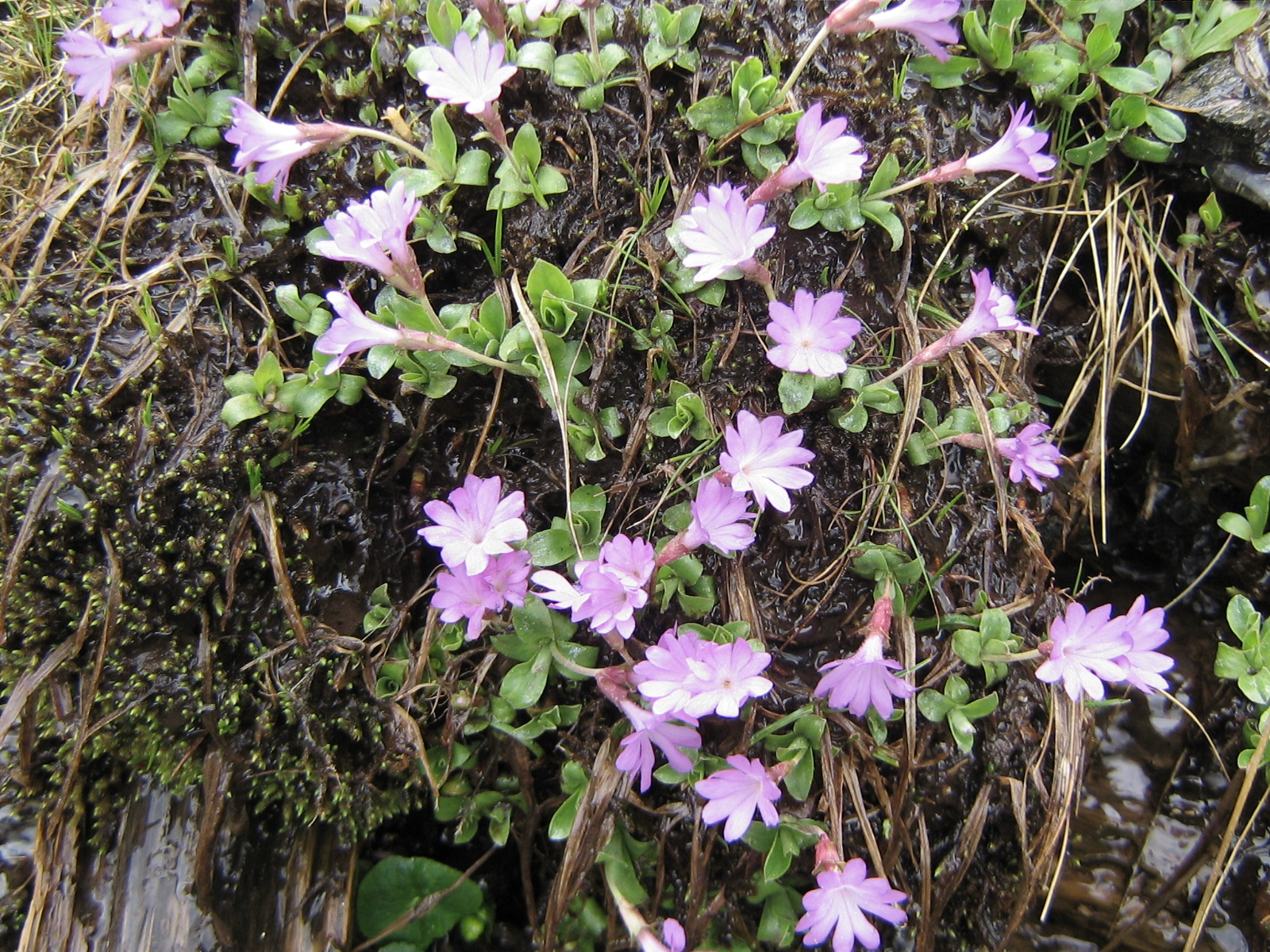 Primevère des Pyrénées